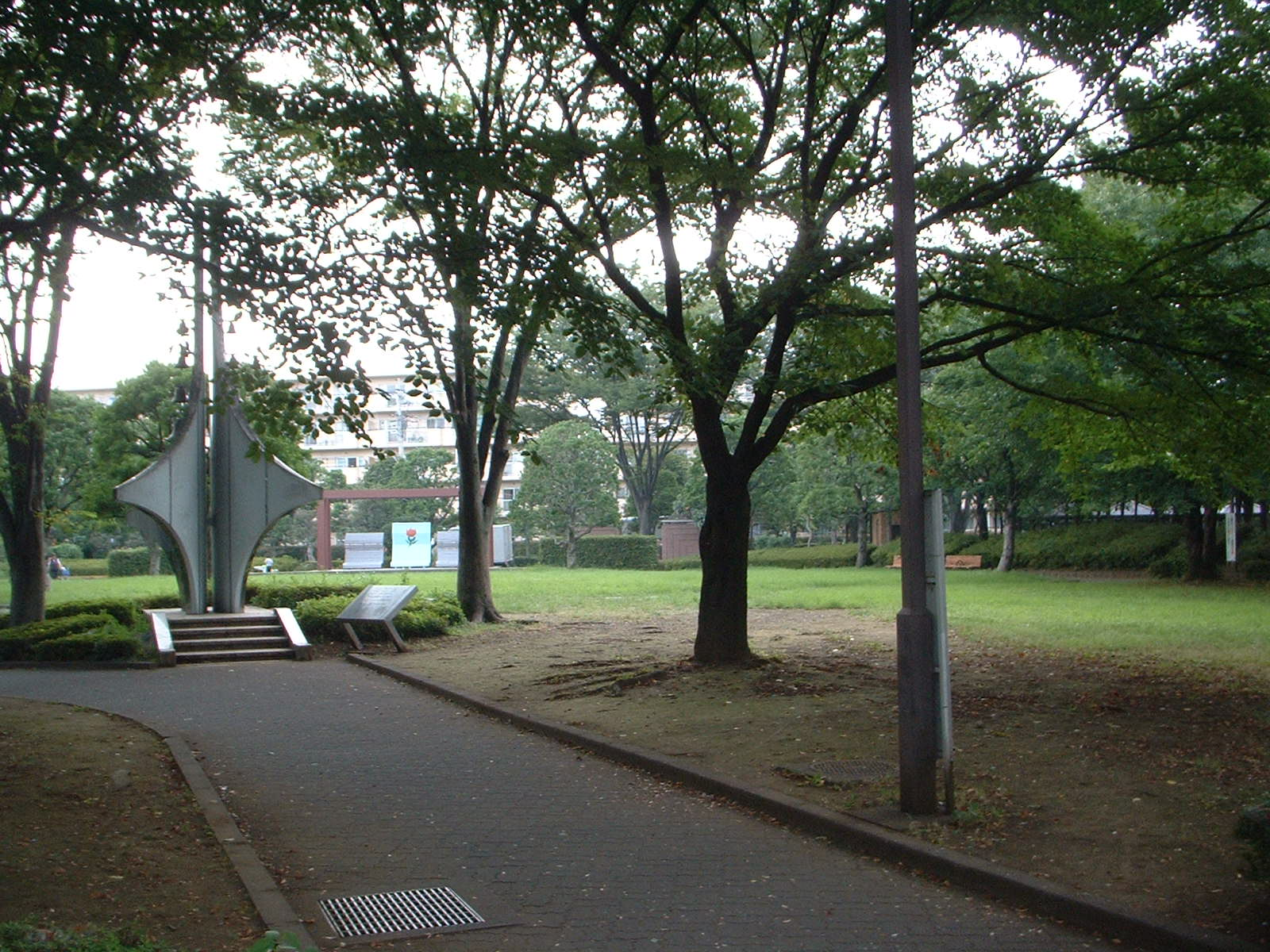 桶川駅の西口にある公園。再開発のときに設置。